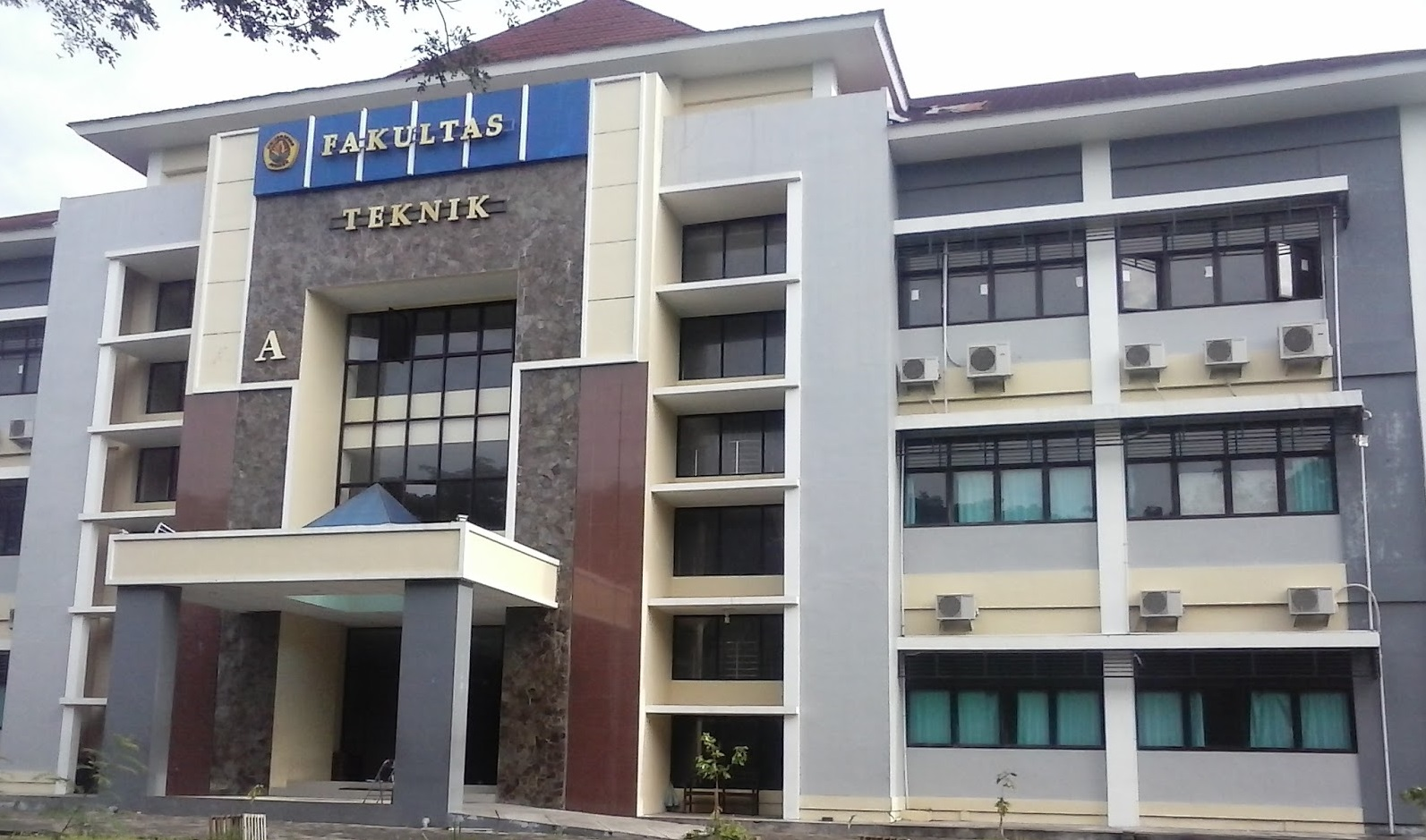 Gedung A Teknik Unej